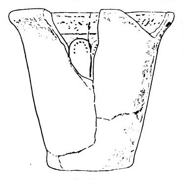 Atelier de Saint-Rémy-en-Rollat, Allier. Moule de gobelet de type Aco, forme Déch. 57. Dessin tiré de Joseph Déchelette, Les vases céramiques ornés de la Gaule romaine (Narbonnaise, Aquitaine et Lyonnaise), vol. 1, 1904, p. 46, fig. 31.